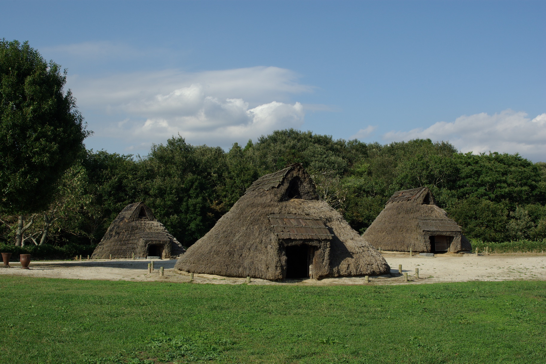 土浦市の上高津貝塚ふるさと歴史の広場